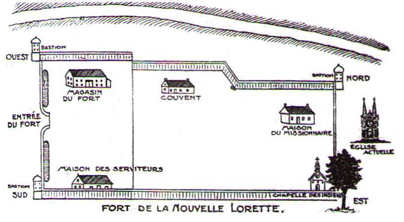 Croquis reconstituant le fort de Nouvelle Lorette